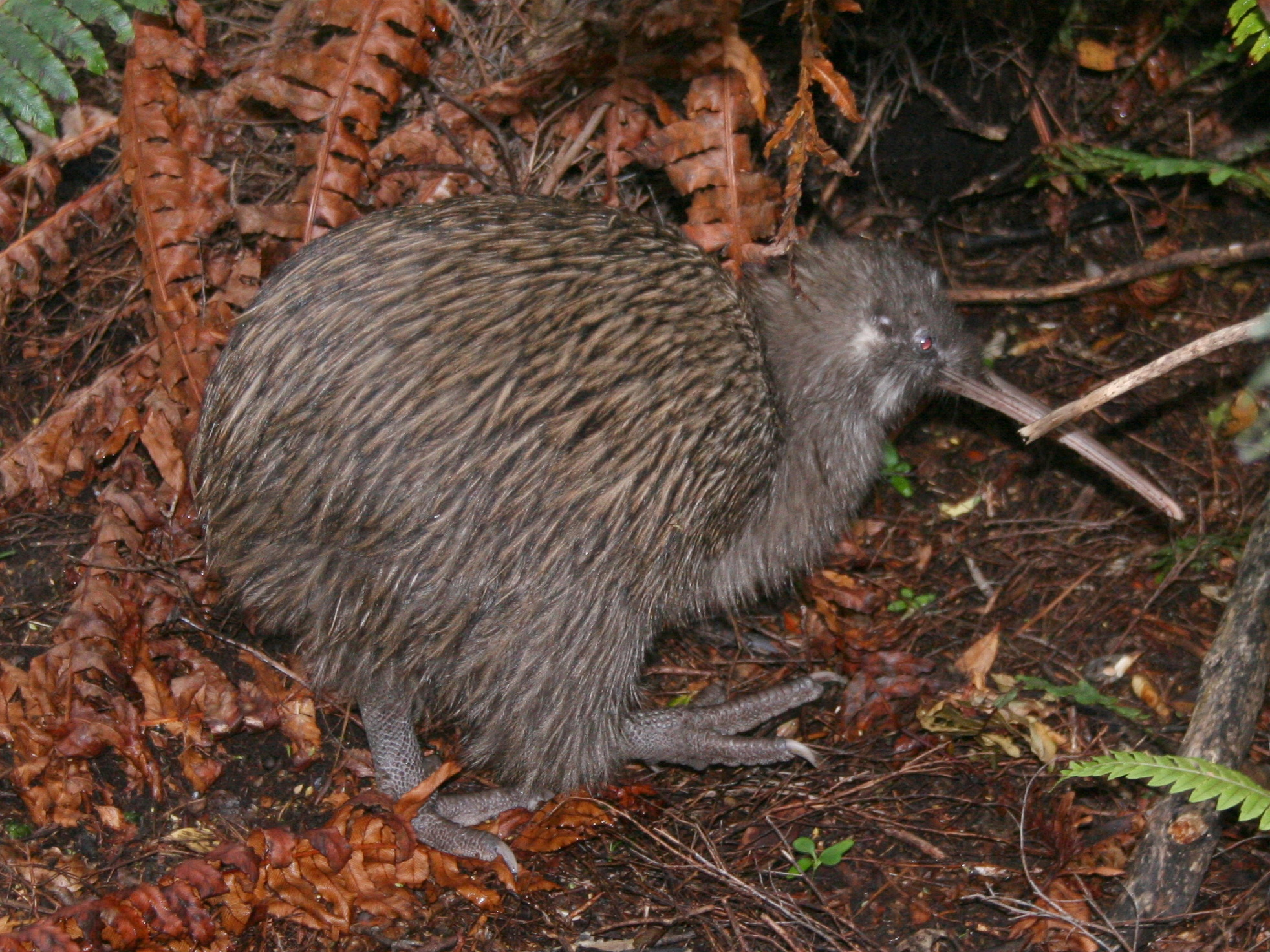 Tokoeka, Apteryx australis; wild bird